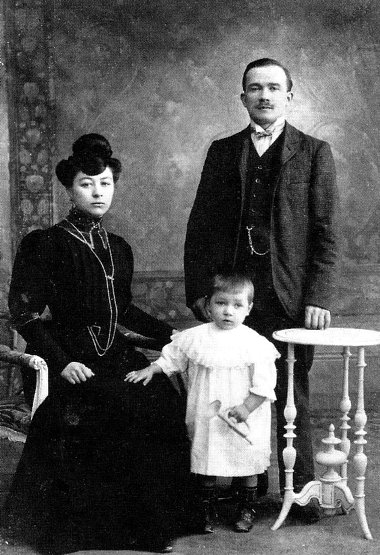 Jules Bonnot, futuro anarquista expropriador membro do bando bonnot, com sua mulher e filho, em uma foto anterior ao ano de 1906, quando ela o abandona.